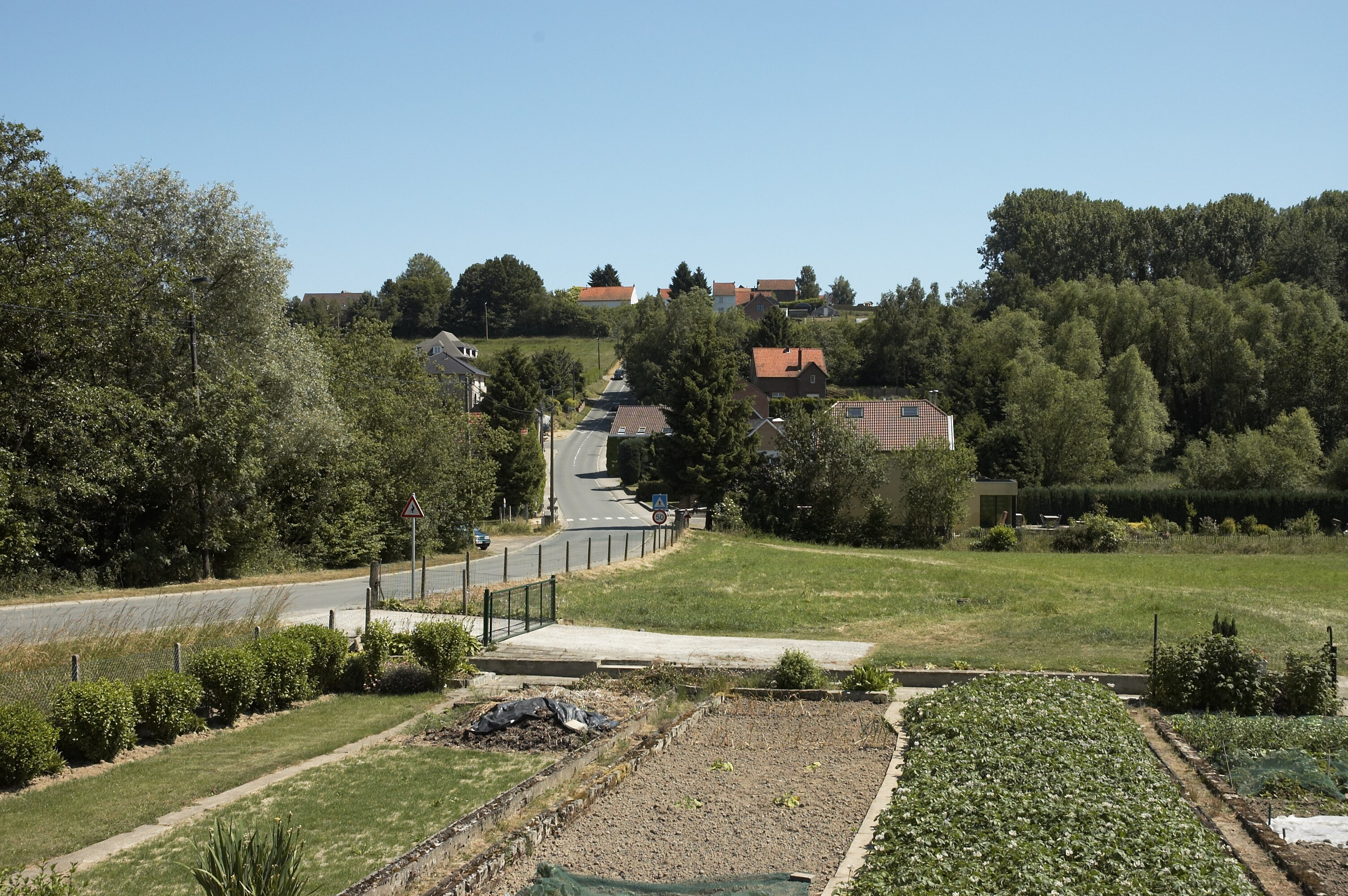 Smeysberg te Huldenberg, België, kijkend richting zuid-oost.